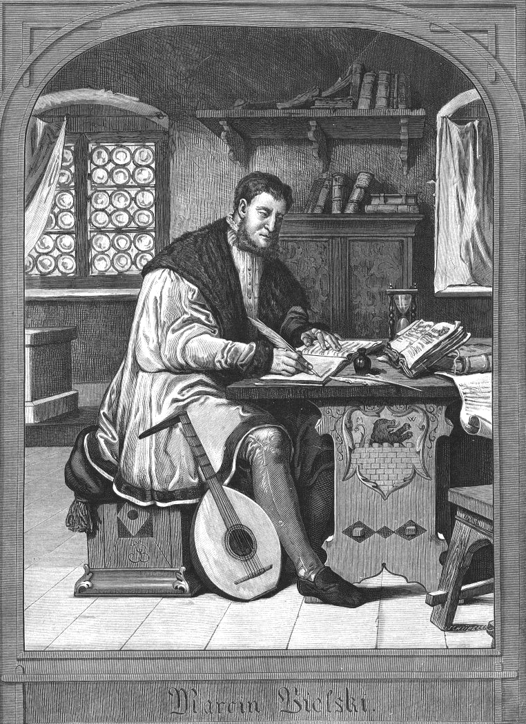 Darstellung des Marcin Bielski